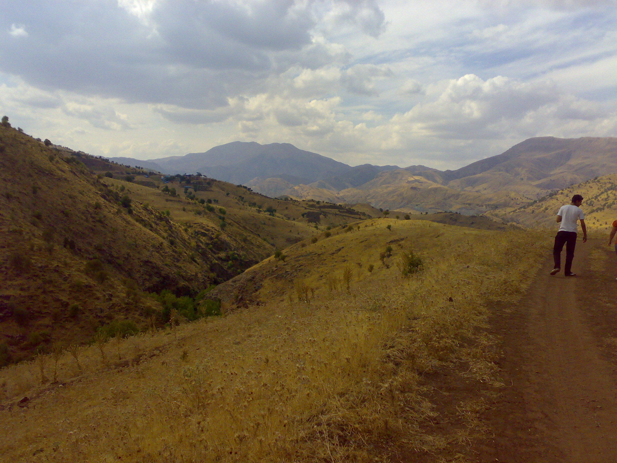 Adıyaman merkeze bağlı Sakallı köyünden bir görüntü.